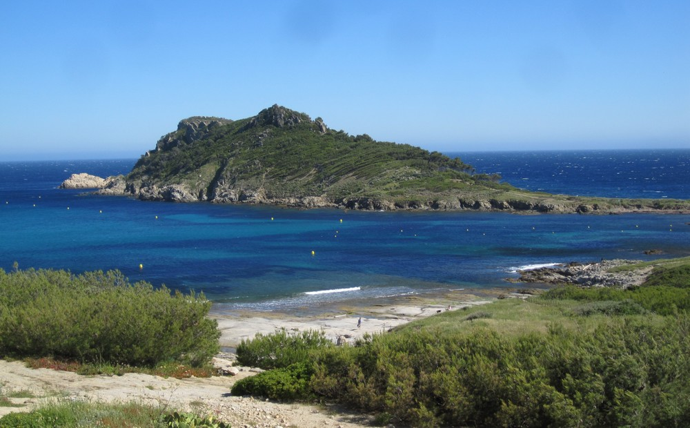 Cap Taillat - Var - France